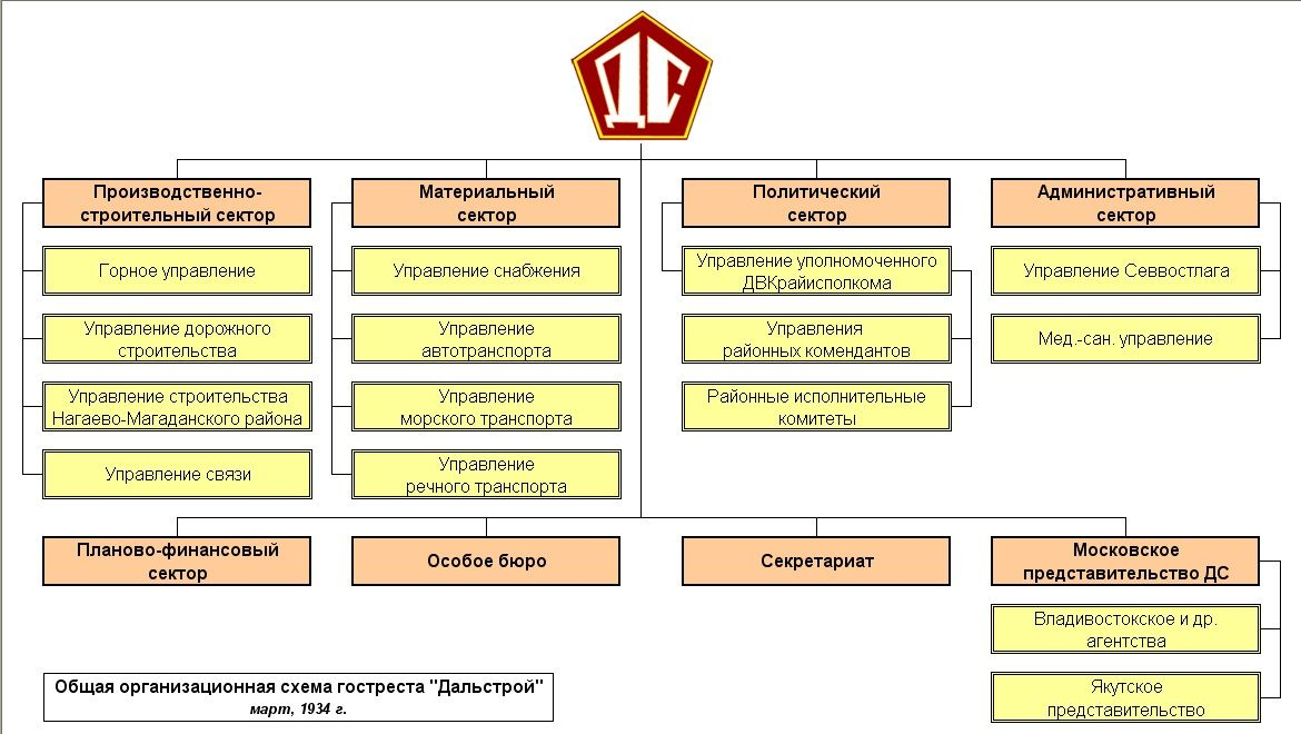 Общая организационная схема треста Дальстрой. Март 1934 г.